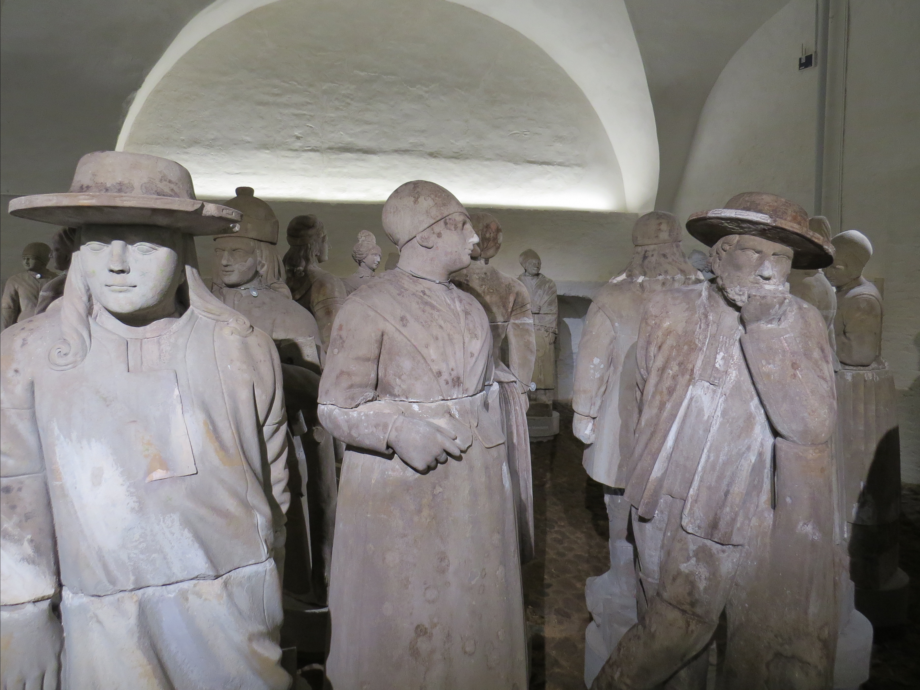 Skulpturer af J. G. Grund efter forlæg af J. C. Garnaas, Kongernes Lapidarium, København